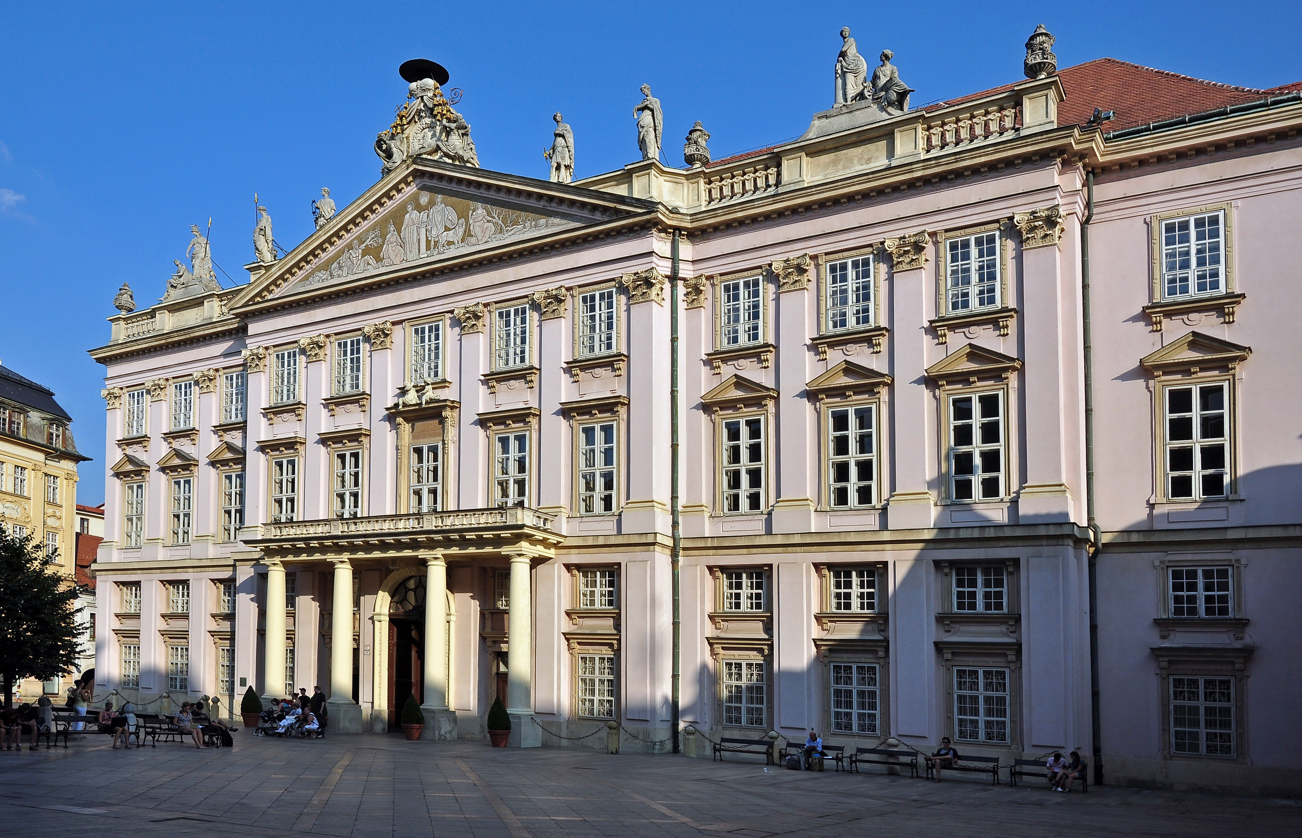 Bratislava, Primaciálny palác, Slovensko